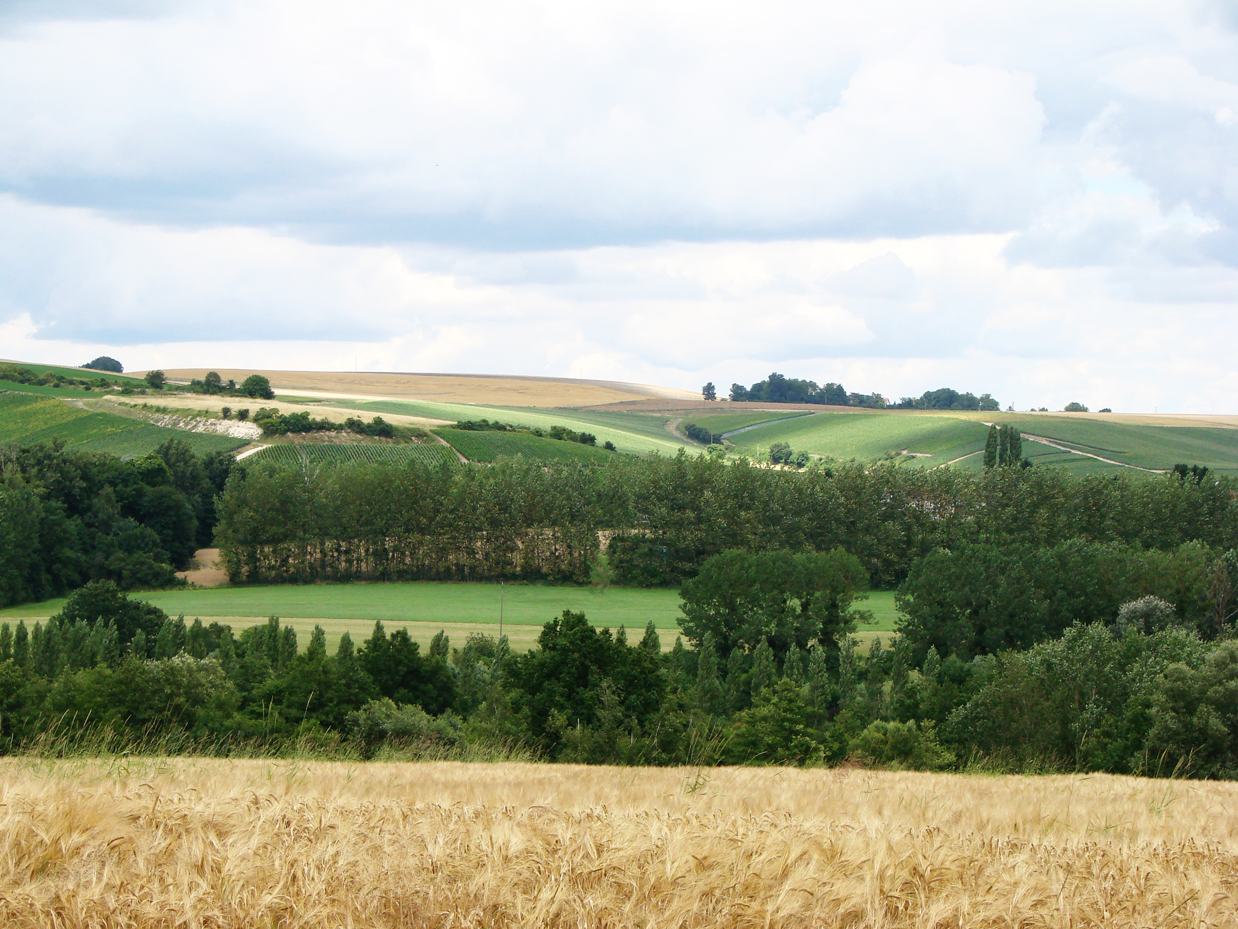 La vallée de l'Ardre près de Savigny-sur-Ardres.